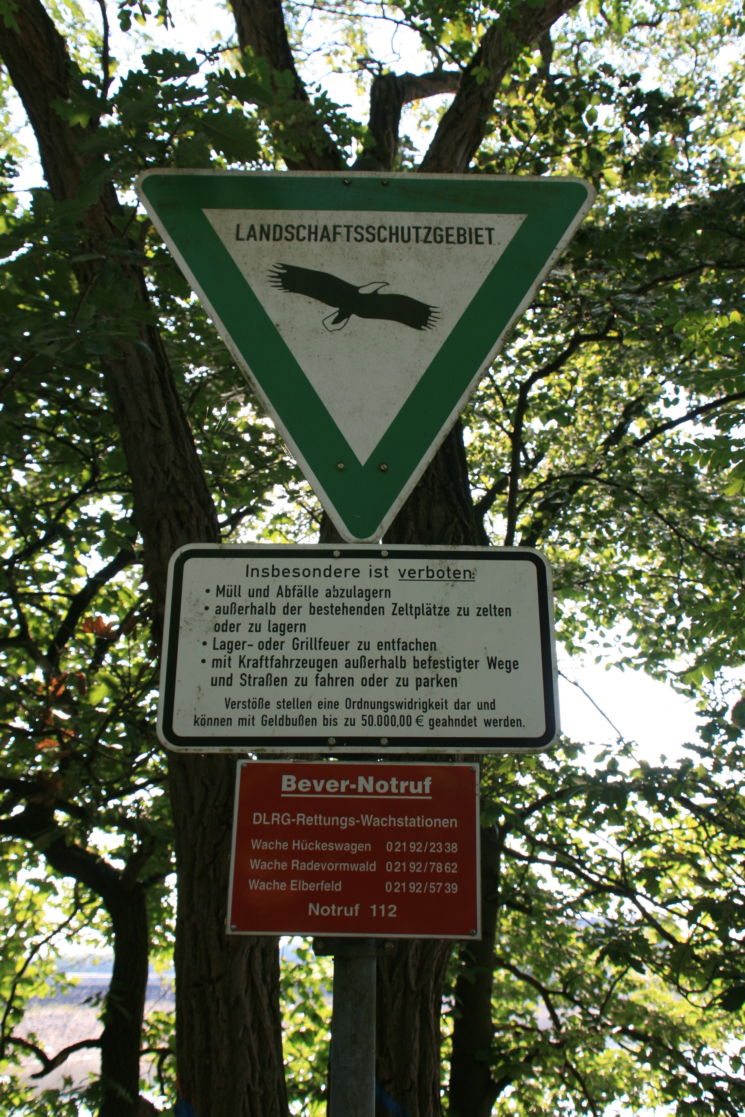 Bevertalsperre, Reinshagenbever in Hückeswagen, Schild Landschaftsschutzgebiet